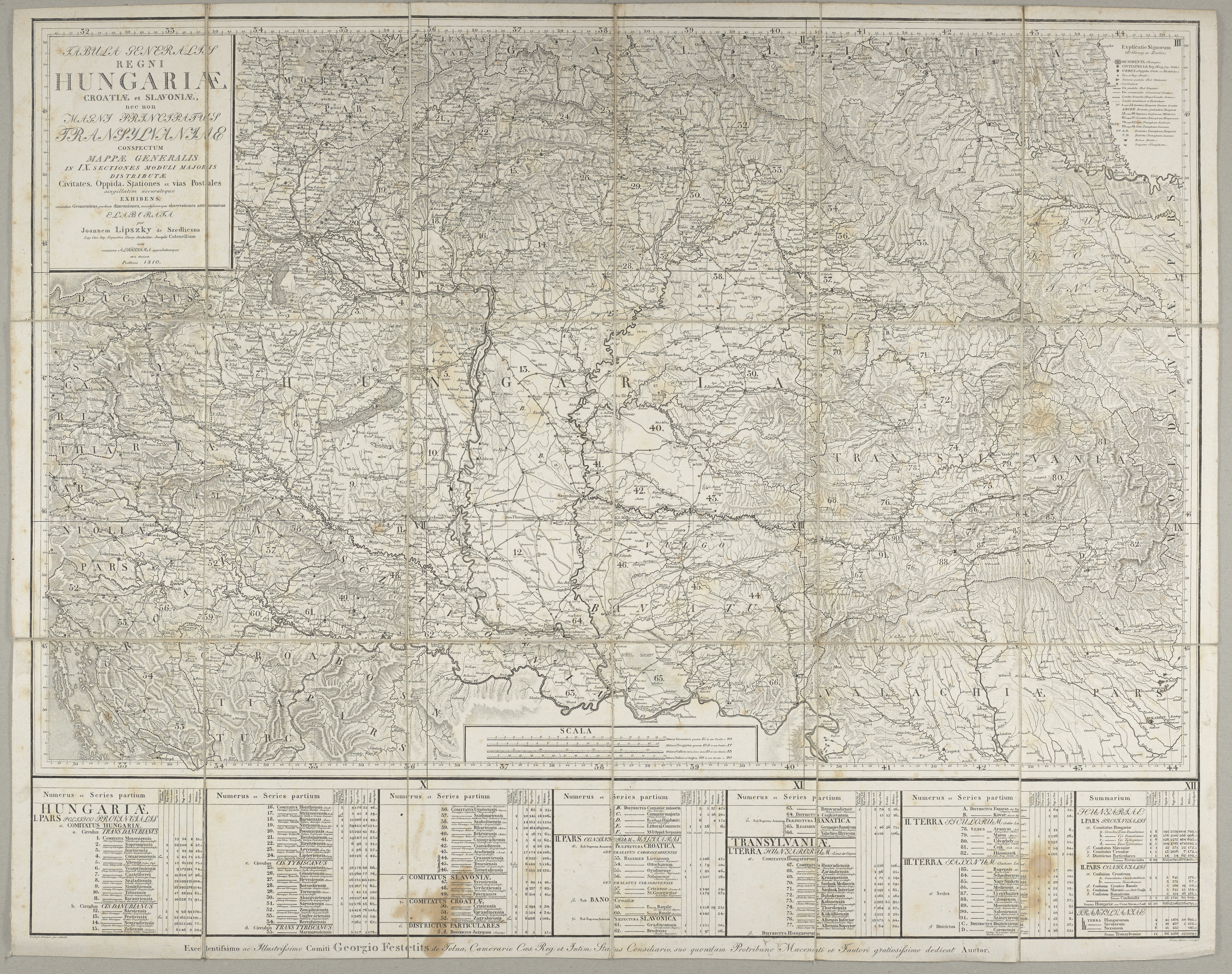 1 Kt. : unkolor. (68 x 44 cm); Koordinaten E 14°21'00"-E 27°01'00"/N 49°37'00"-N 44°10'00"; Maßstab in graph. Form (Milliaria Germanica, Milliaria Hungarica, Milliaria Hungarica, Milliaria Italica). - Nullmeridian: Ferro. - Titelkartusche oben links. - Erl. oben rechts. - Mit 1 Verwaltungstabelle unten am Kt.-Rand. - Ersch. als Übersichtsbl. zur Kt.: Mappa Generalis Regni Hungariae partiumque adnexarum Croatiae, Slavoniae et Confiniorum Militarium Magni item Principatus Transylvaniae. - Ohne Relief